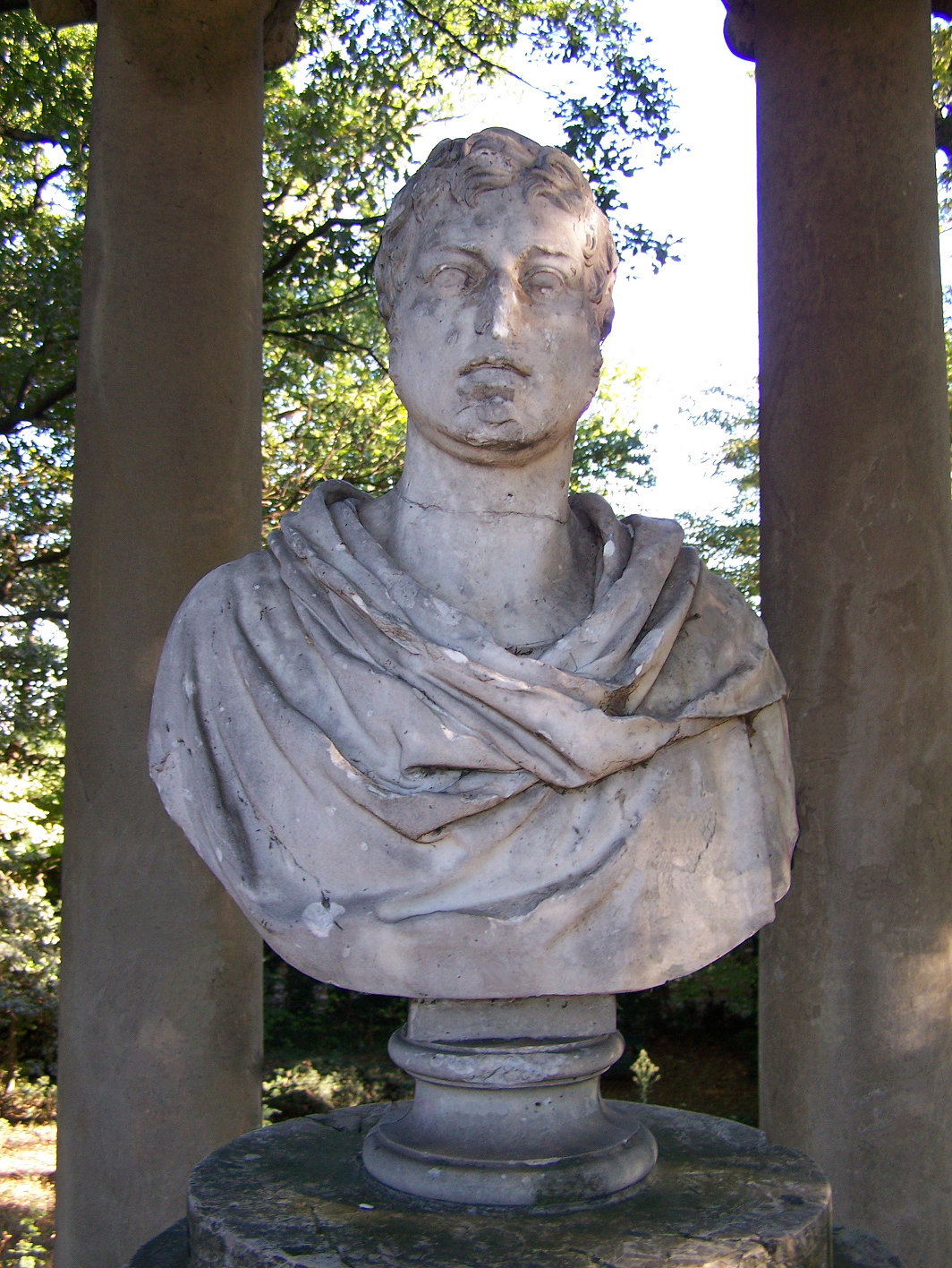 Busto di Alessandro Annoni (1770-1825) nel parco di Villa Annoni a Cuggiono (MI) - Italy